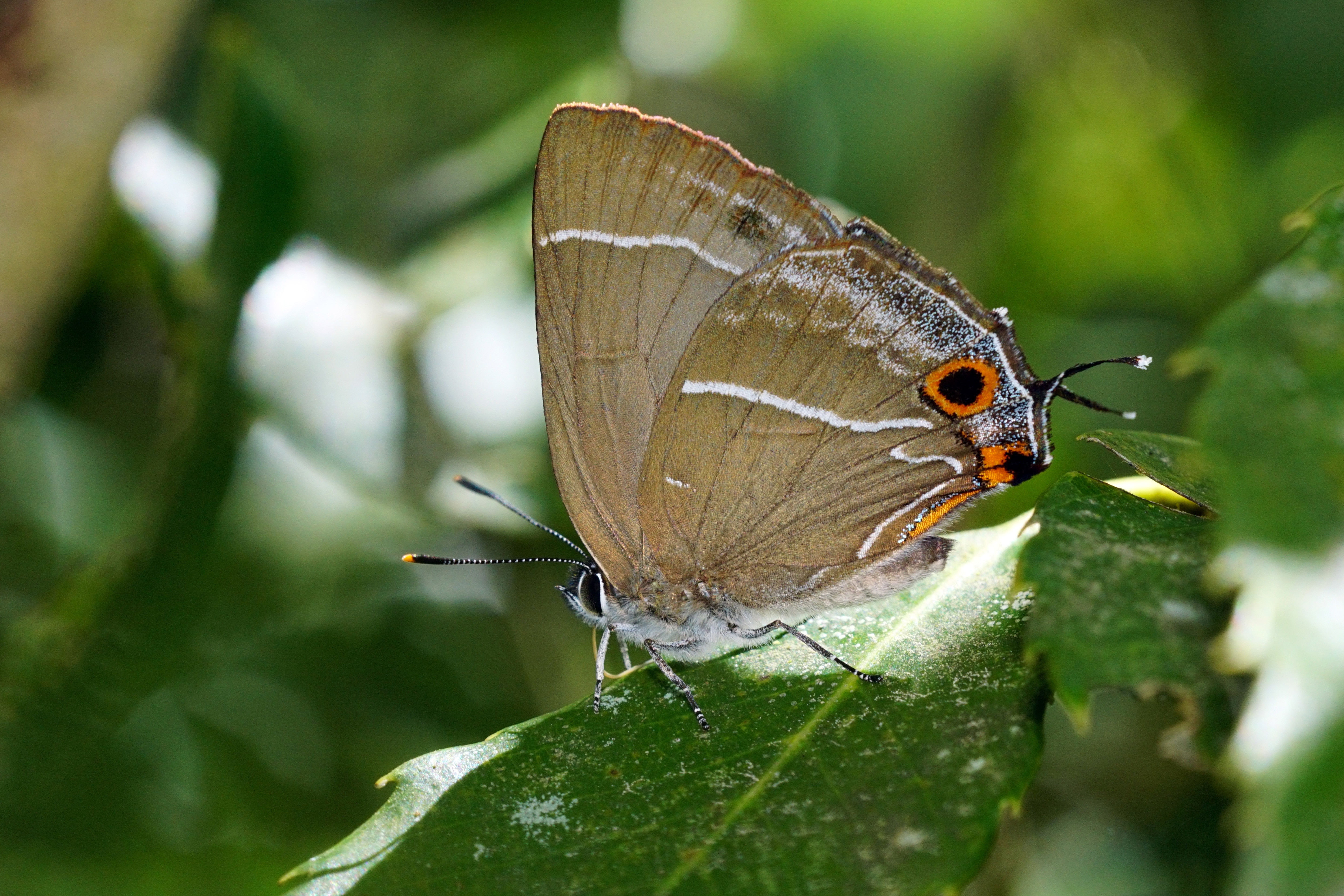 Neozephyrus taiwanus male